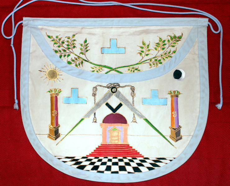 Tablier de vénérable maître du RFM, peint à la main sur soie.